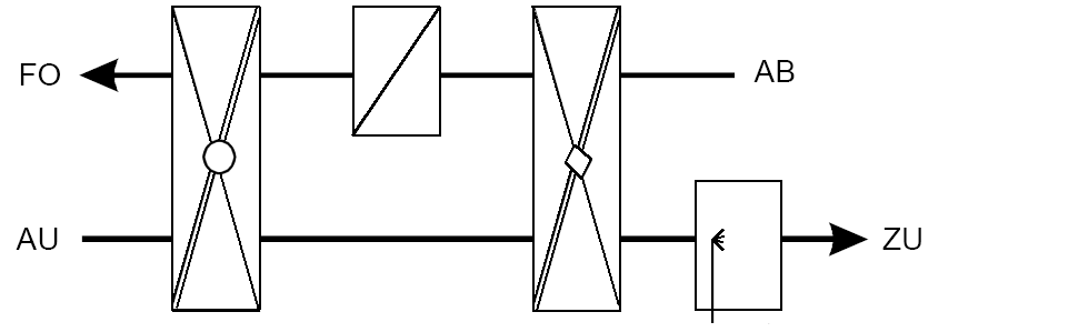 Prinzipschaltbild einer DEC Dessicative and Evaporative Cooling Anlage